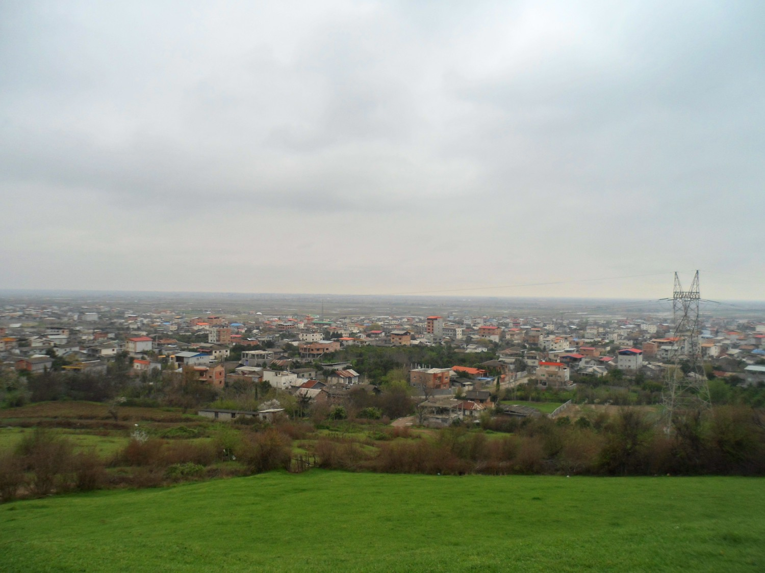 تصویری از وسطی کلا